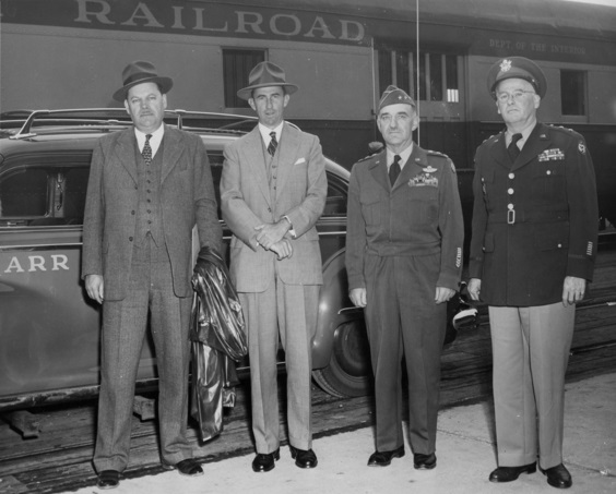 Secretary of the Army Frank Pace in Alaska Railroad car with William E. Kepner, Julian W. Cunningham and an unidentified man.